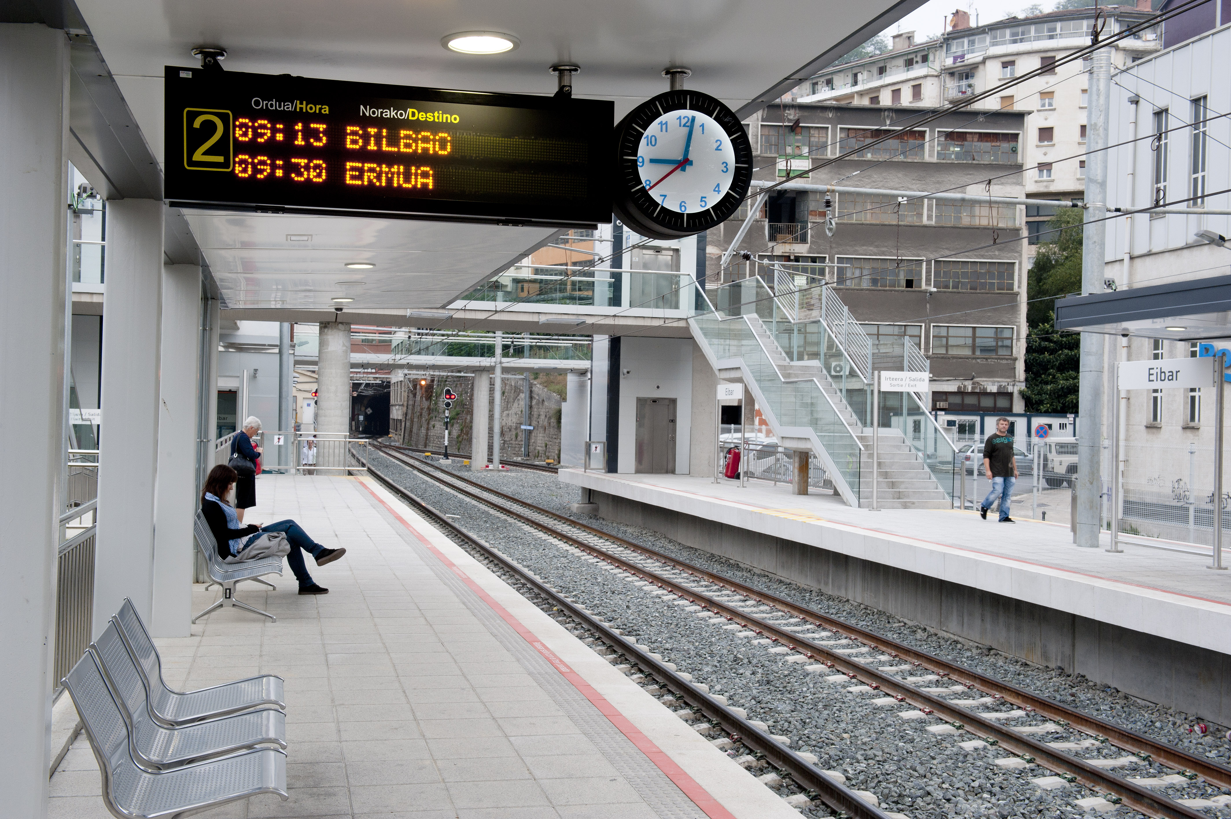 Estación de Eibar